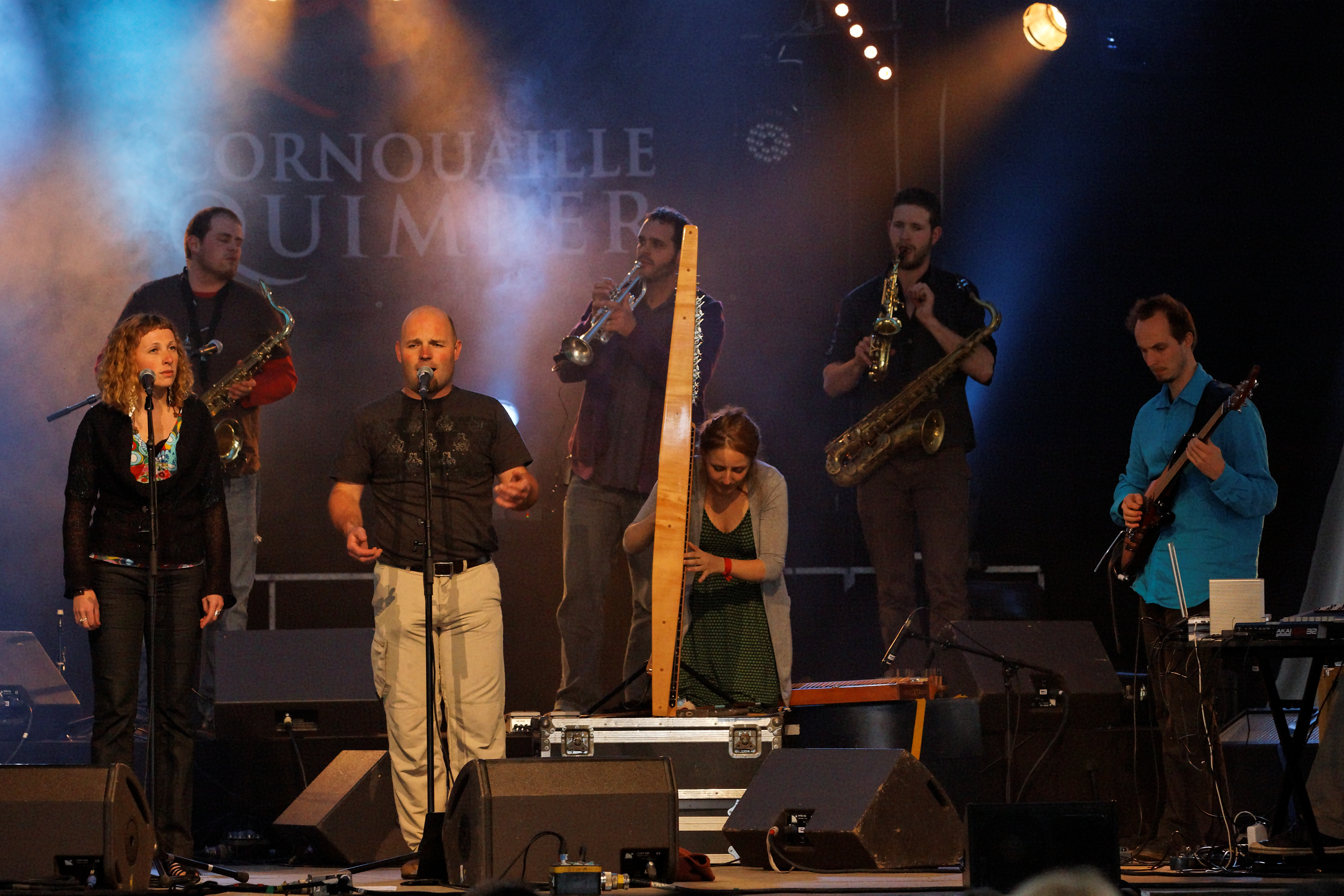 Kreiz Breizh AKademi 3 en concert le 19 juillet lors du festival de Cornouaille 2011.